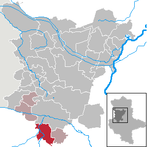 Gröningen in Saxony-Anhalt (Country) - District (Landkreis) Börde